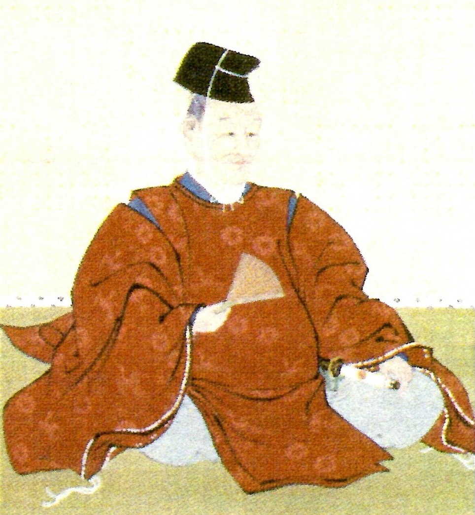 浅野長直の肖像。